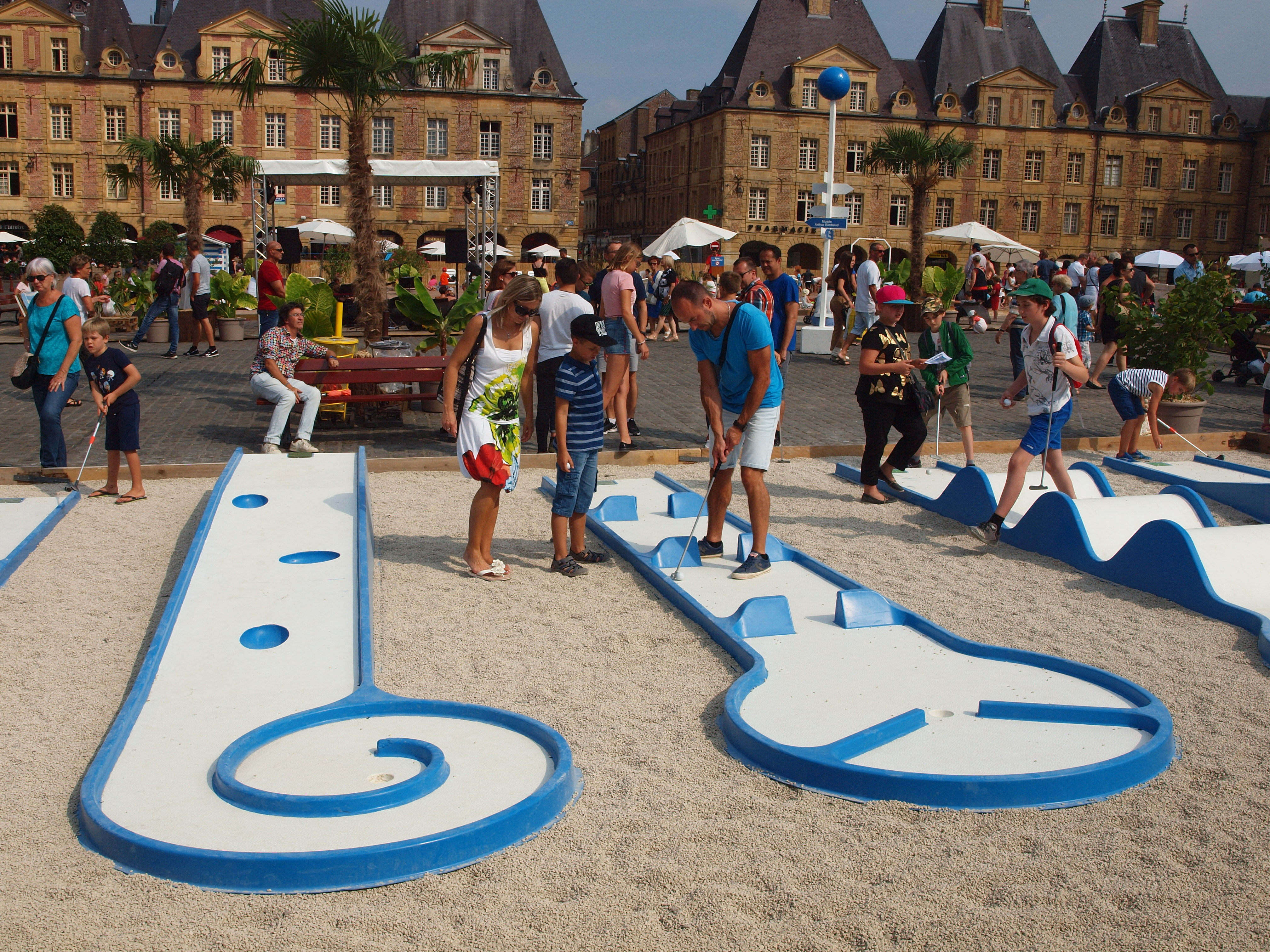 La Plage ducale, en 2018, sur la Place ducale de Charleville-Mézières (Ardennes, France)